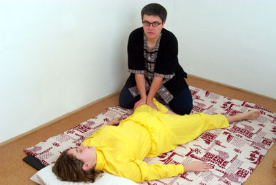 Uvolňování kyčlí a pánve je zřejmě nejcennějším vkladem této techniky